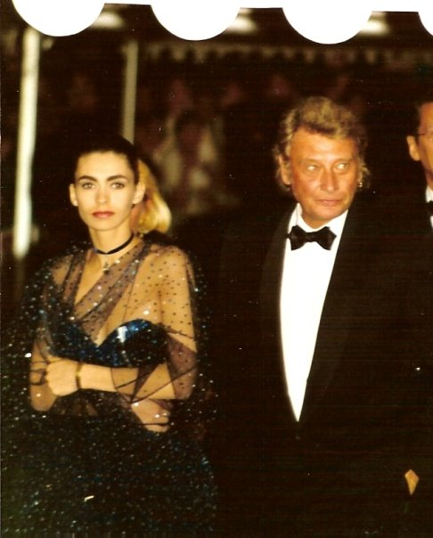 Johnny Hallyday et son épouse Adeline Blondieau (appelée alors Adeline Hallyday) au festival de Cannes.